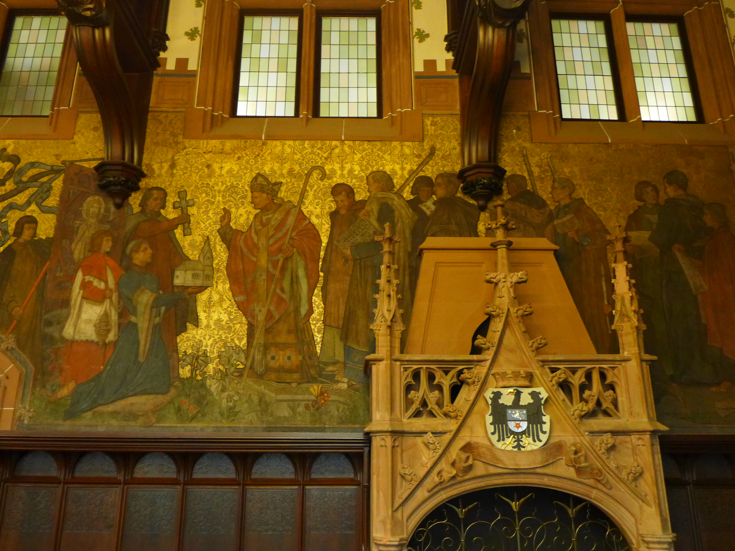 Rathaus St. Johann, Festsaal, Gemäldeausschnitt "Die Weihe der St. Johanner Kirche"